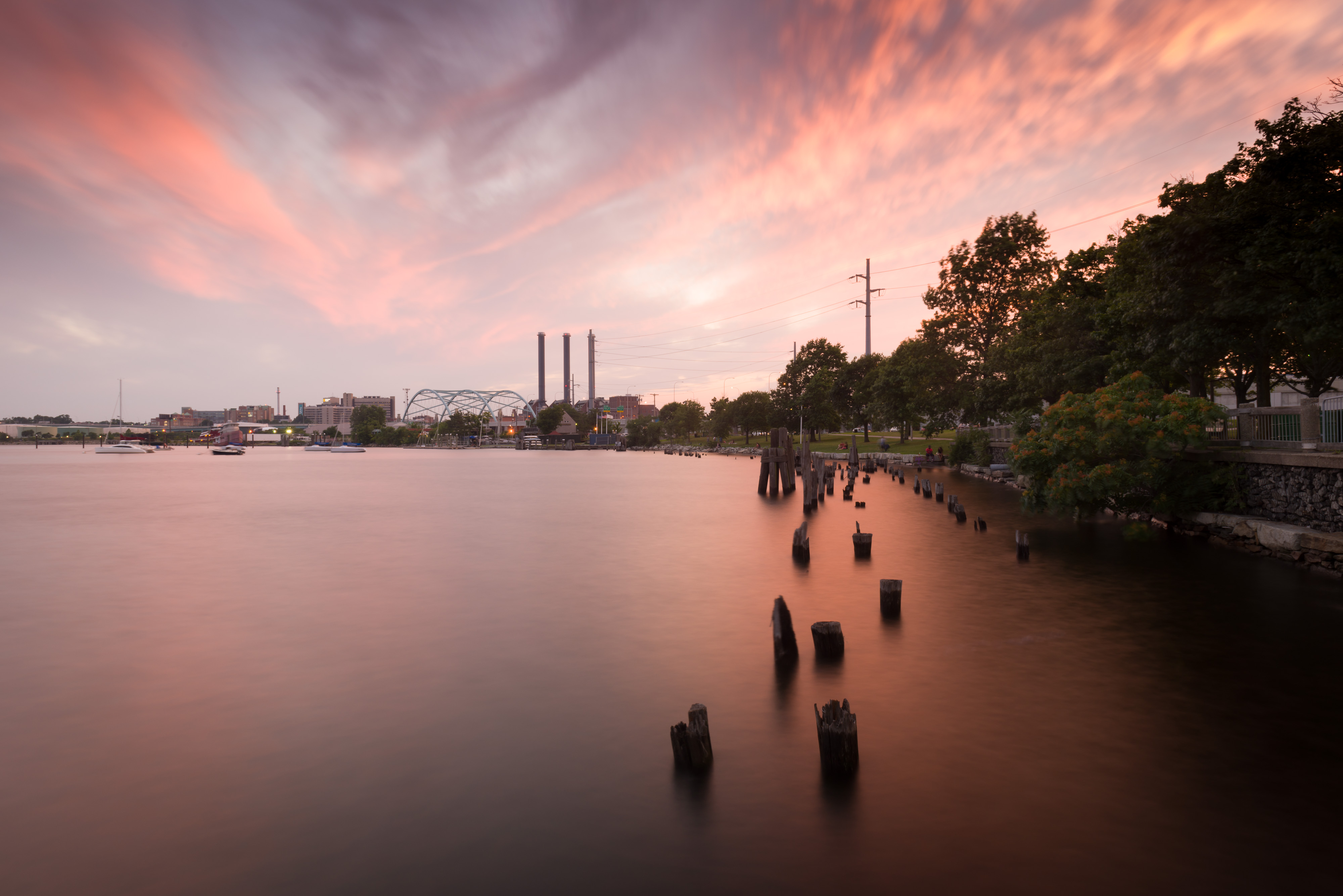 India Point Park